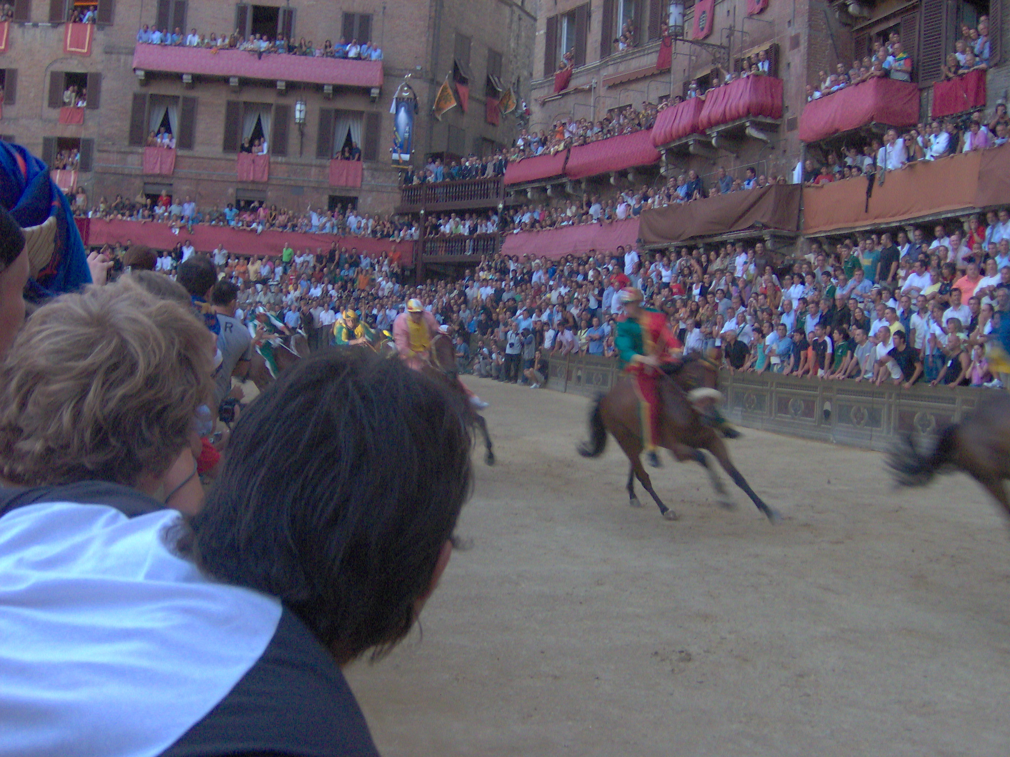 Image del corte del Palio di Siena - agosto 2006